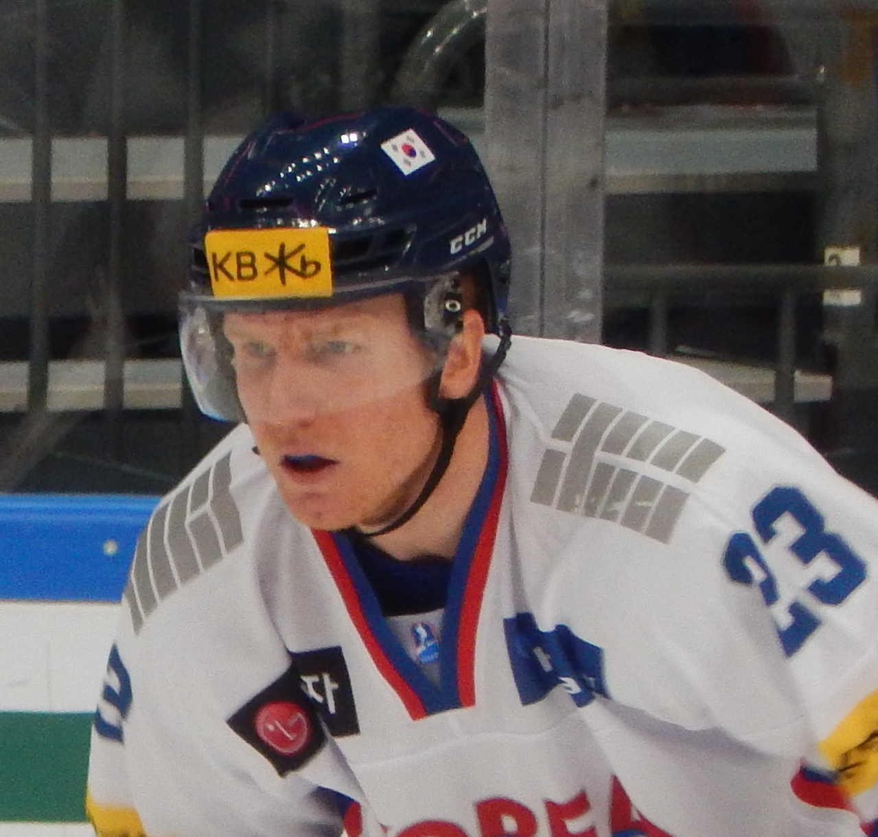 Кубок Первого Канала 2017, матч Финляндия - Южная Корея (15 декабря 2017) 23 MACKIE,Regan Erik